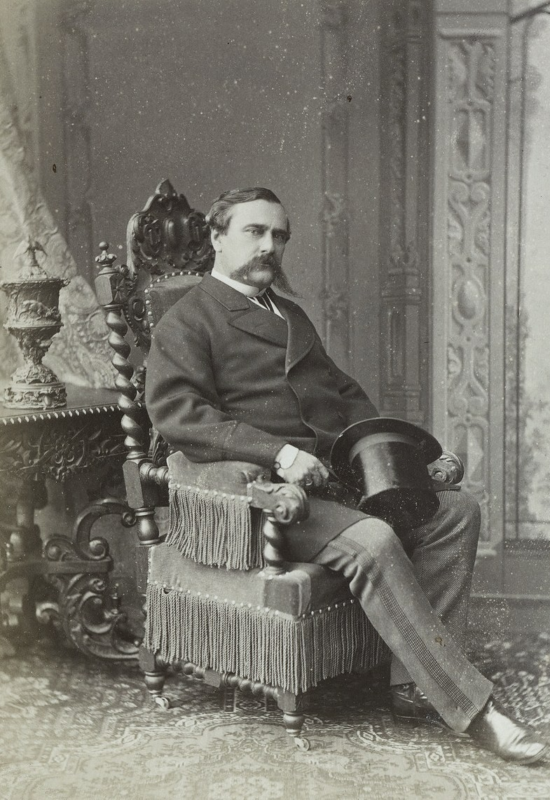 Граф Григорий Александрович Строганов (1824-1878)